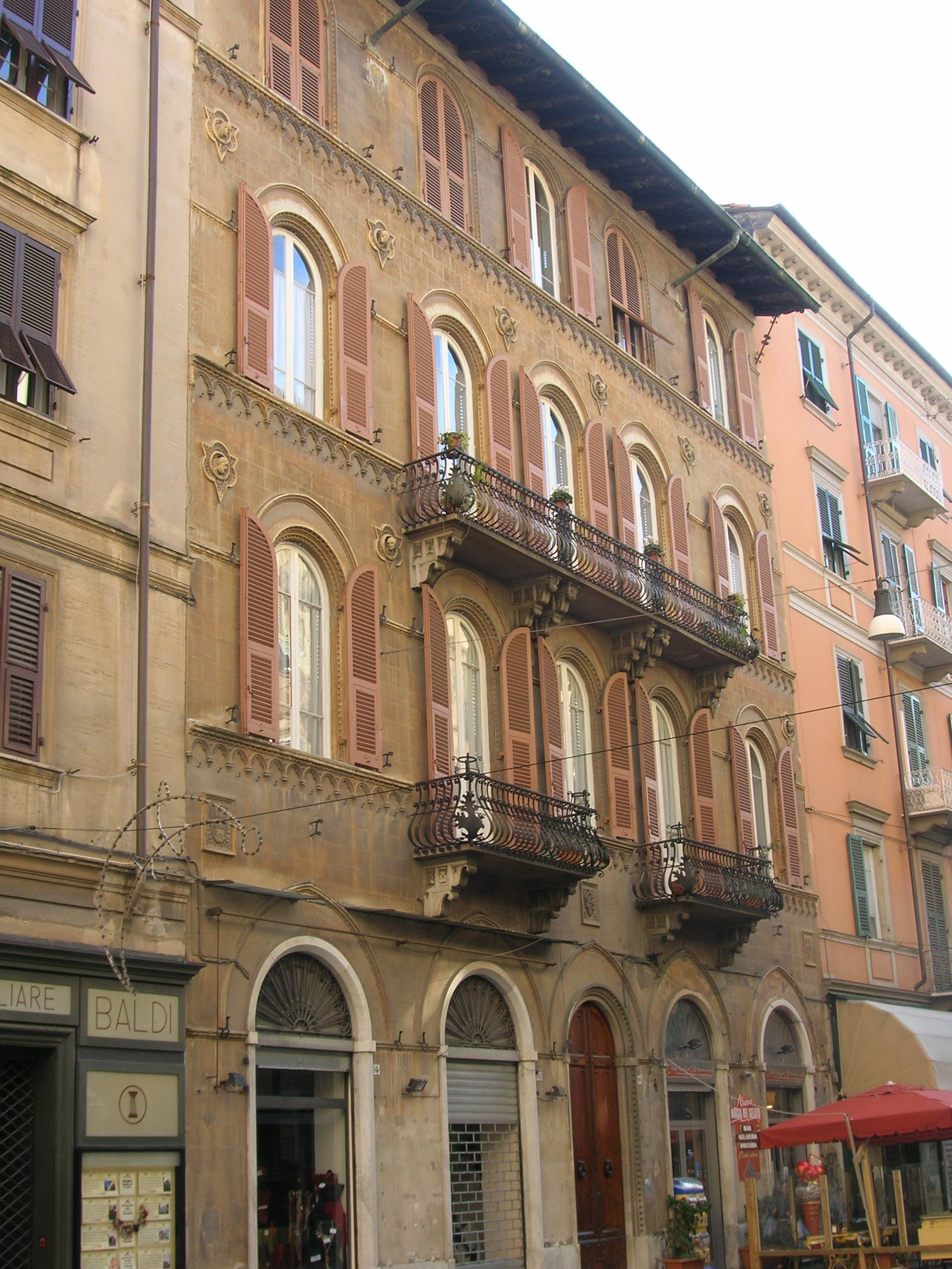 La Spezia - Palazzo Carletti